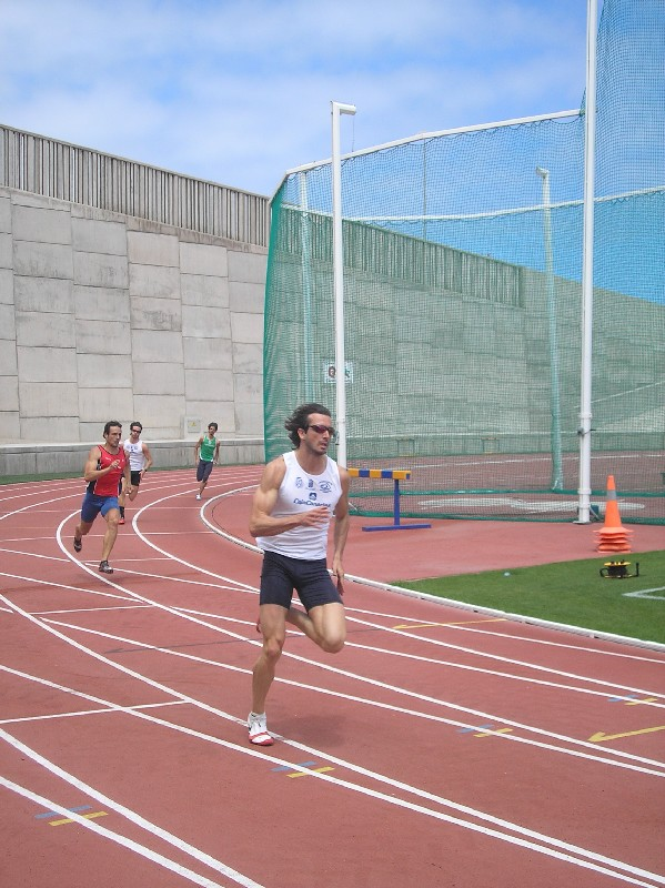 Foto de Iván Rodríguez Ramallo corriendo 400m en Los Realejos para el Club Atletismo Puerto Cruz Realejos